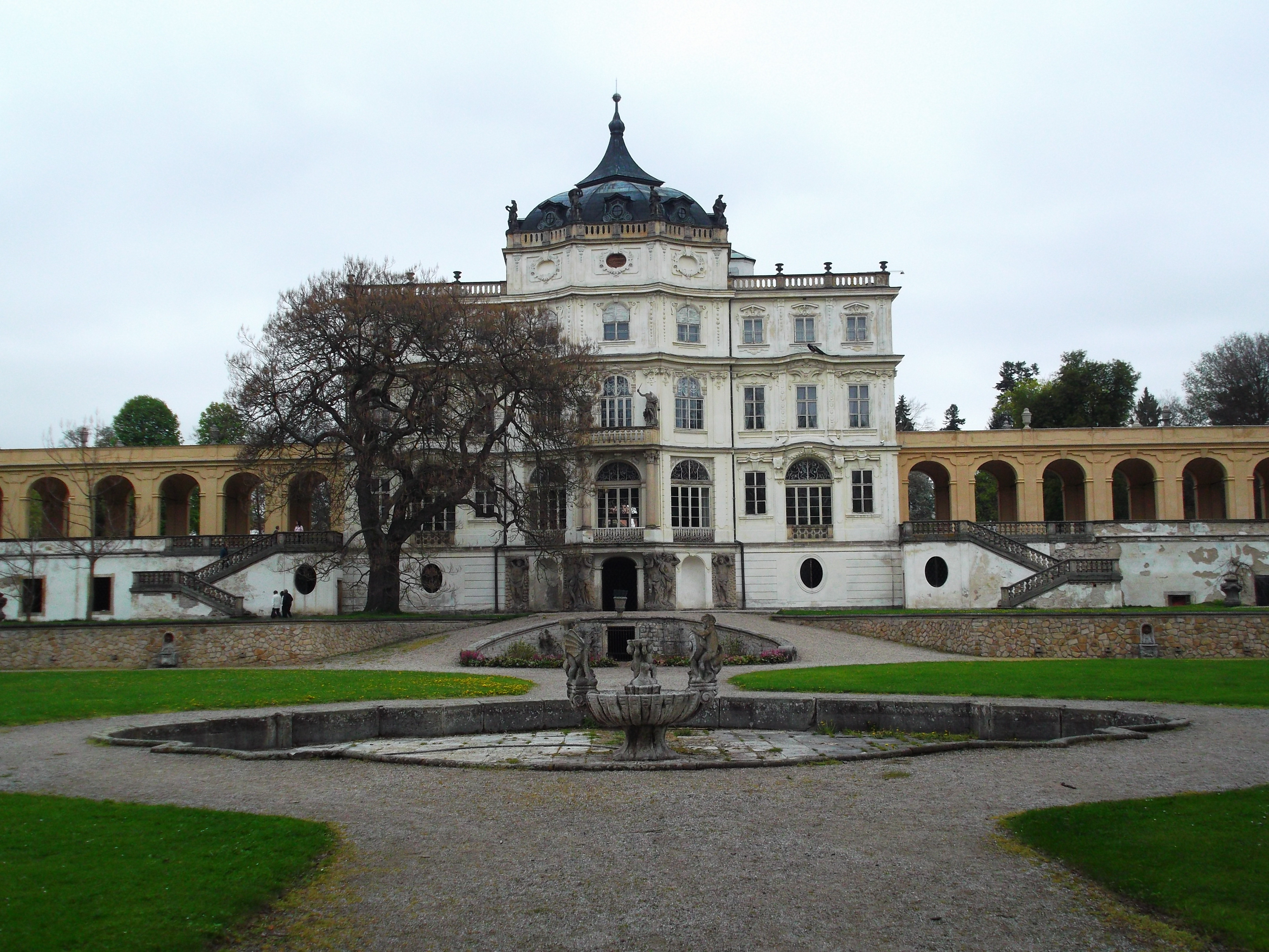 Pohled od zahradní kašny na ploskovický zámek.